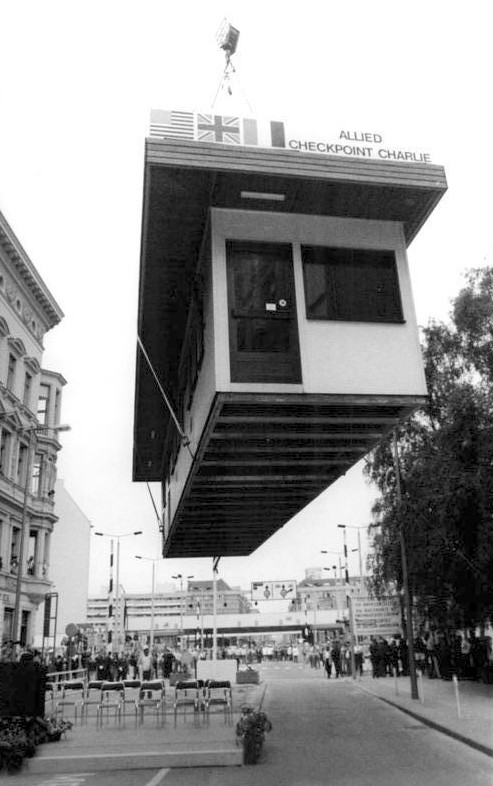 ADN-Grimm-22.6.90-Berlin: Außenministertreffen - Seinen letzten Morgen erlebte der Kontrollpunkt der Westalliierten im Herzen Berlins, der als "Checkpoint Charlie" in die Geschichte eingegangen ist. Zum Auftakt der Zwei-plus-Vier-Außenminstergespräche wurde das Wachgebäude in Anwesenheit hoher Politprominenz demontiert und - "ging in die Luft". "